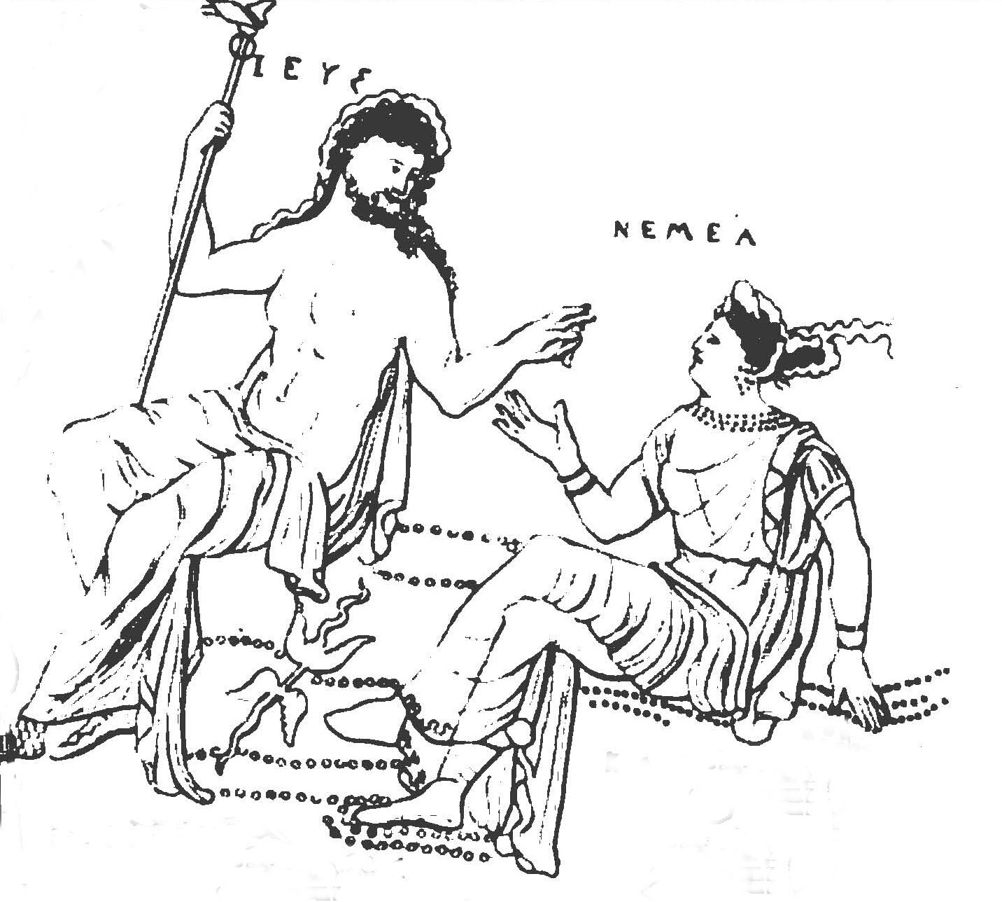 Archemorosvase mit dem Tod des Archemoros, Ausschnitt: Nemea (rechts) im Gespräch mit Zeus (Nachzeichnung). Rotfiguriger Volutenkrater aus Ruvo (Apulien), um 340 v. Chr., Neapel, Museo Nazionale, 81394 (H 3255)s